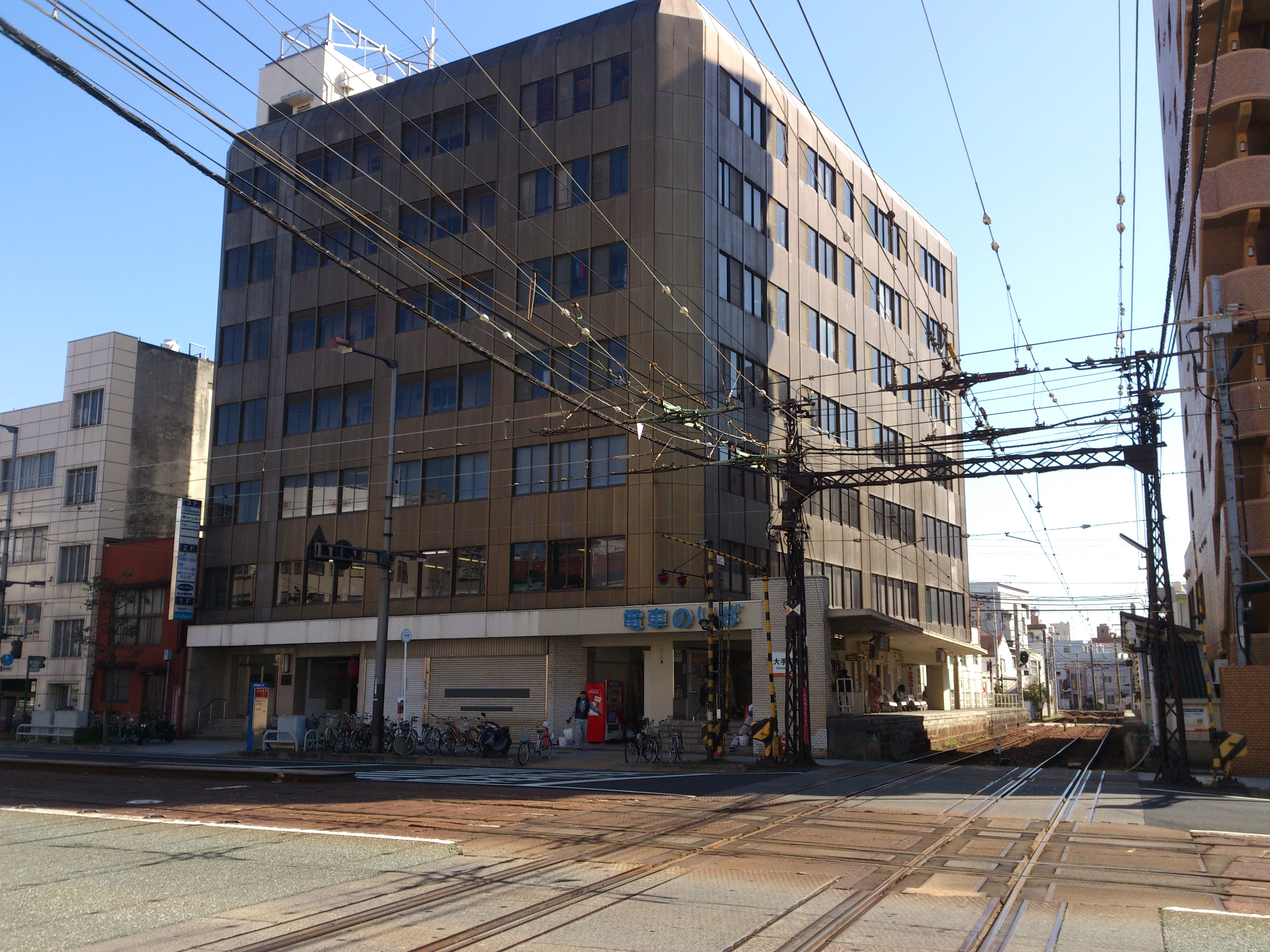 伊予鉄道、大手町駅です。